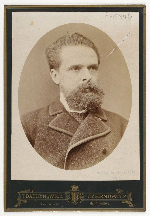 Александр Зупан